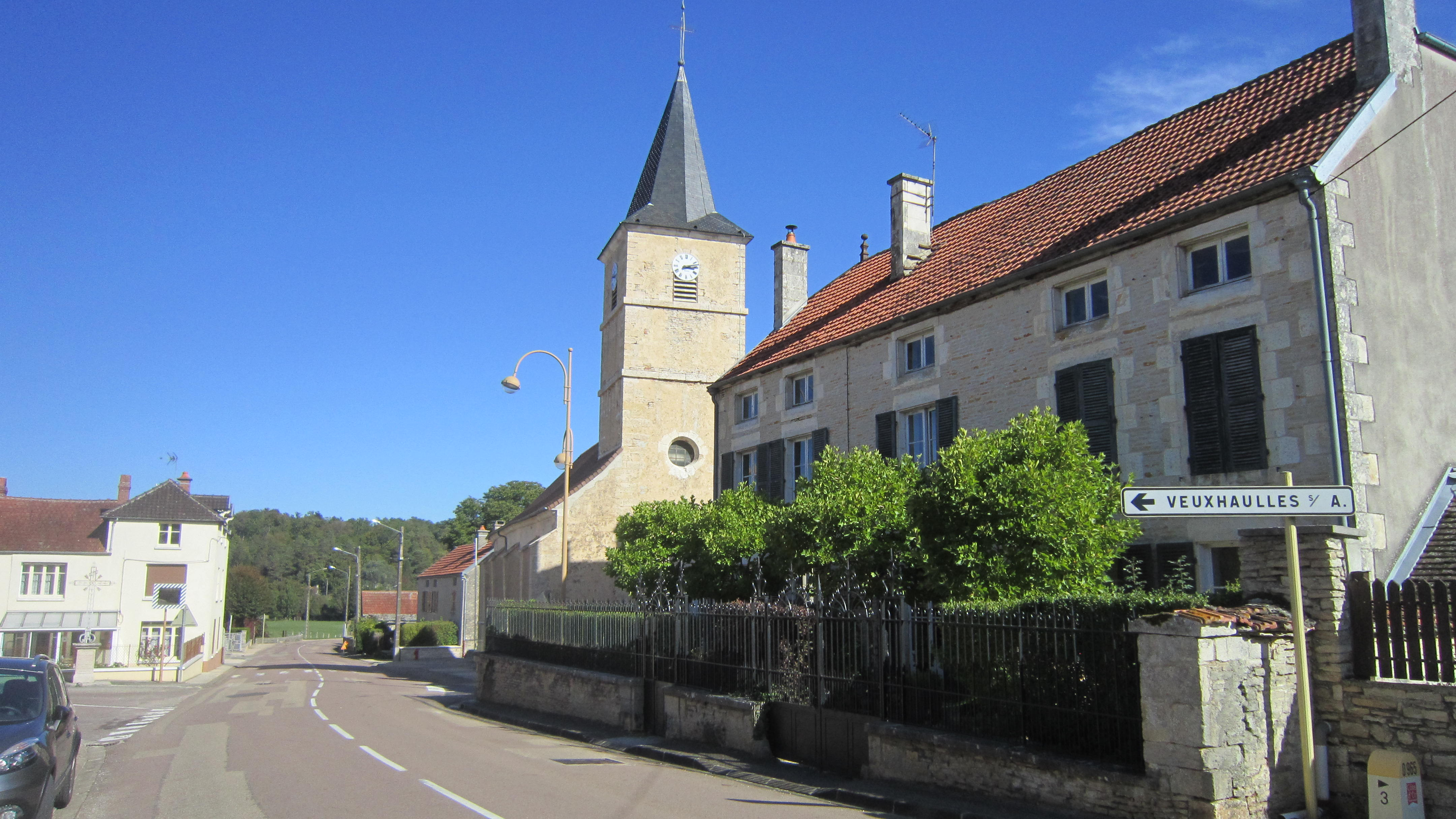 Boudreville (Côte-d'Or)